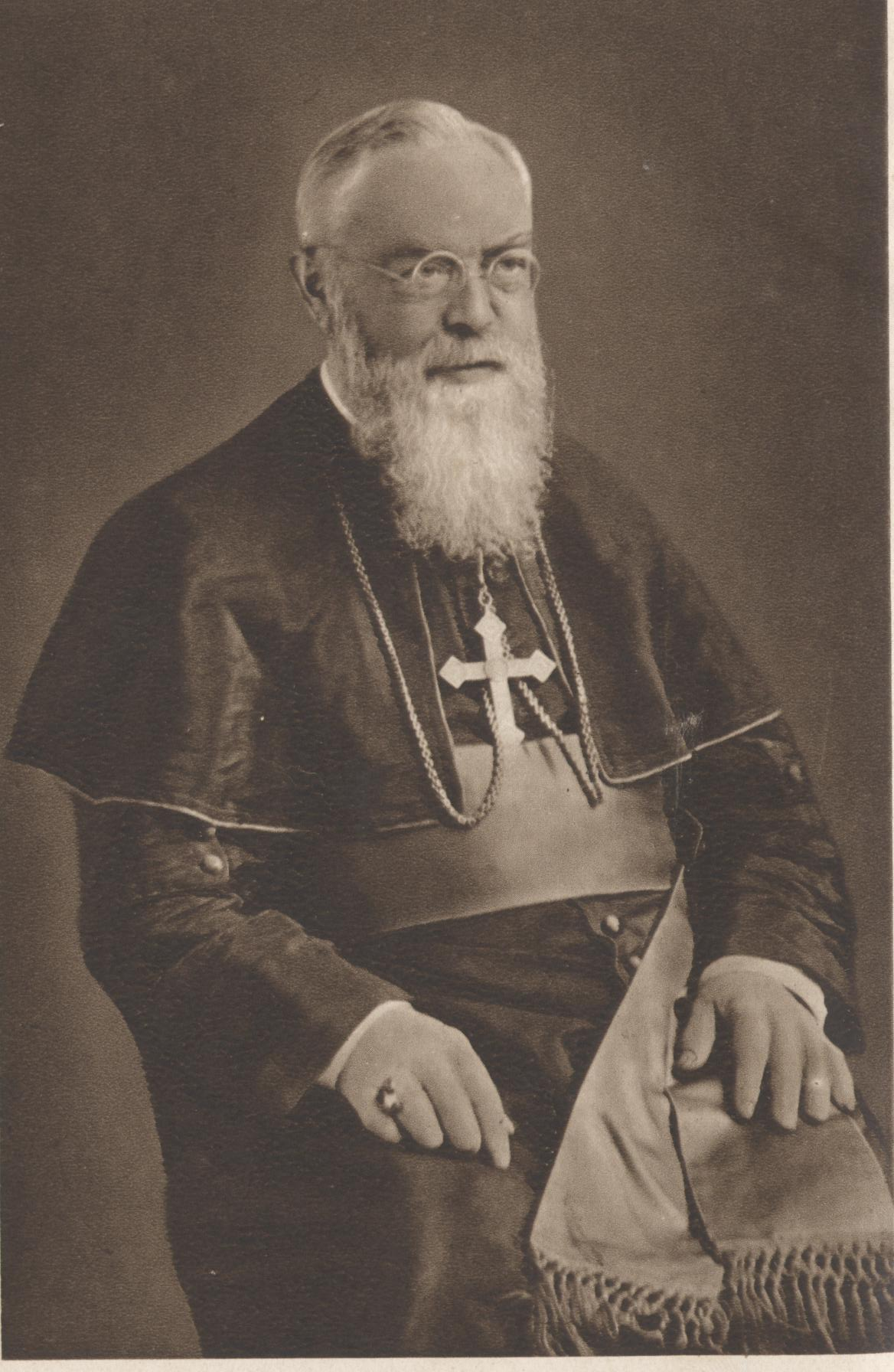 Bischof Augustin Hennighaus, China, 1922